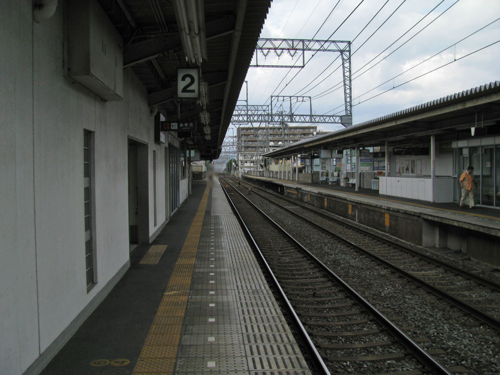 近鉄線伊勢田駅